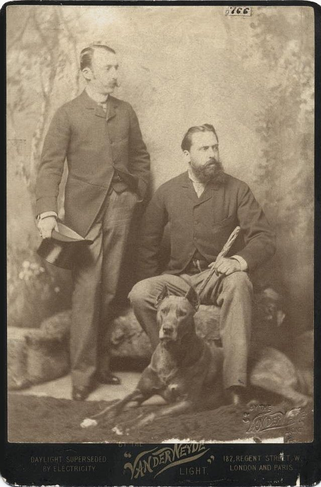 El marqués de Cerralbo con Don Carlos